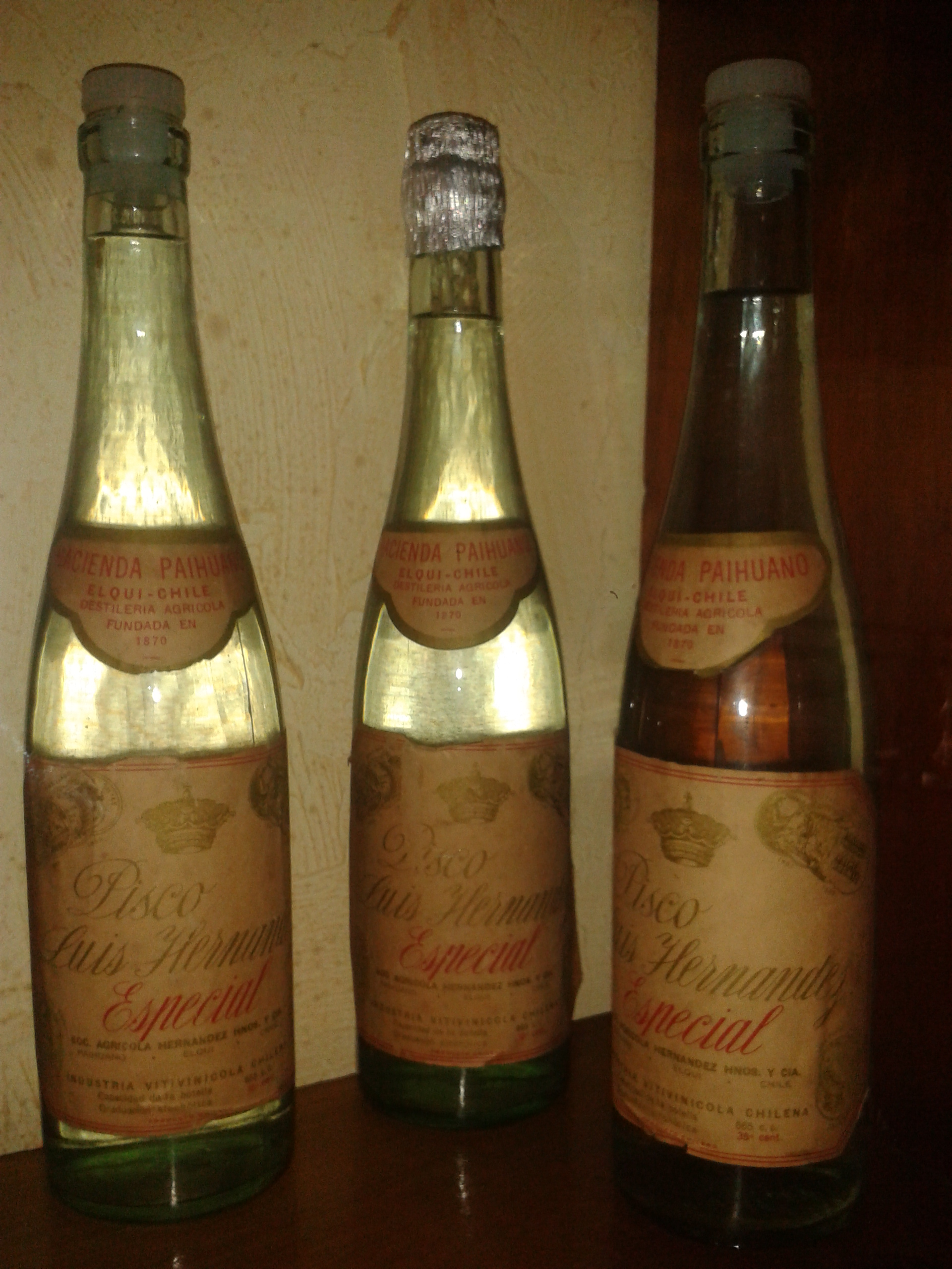 Antiguas botellas de pisco Luis Hernández, producido por la Sociedad Agrícola Hernández Hermanos y Cía (Paihuano, Chile)